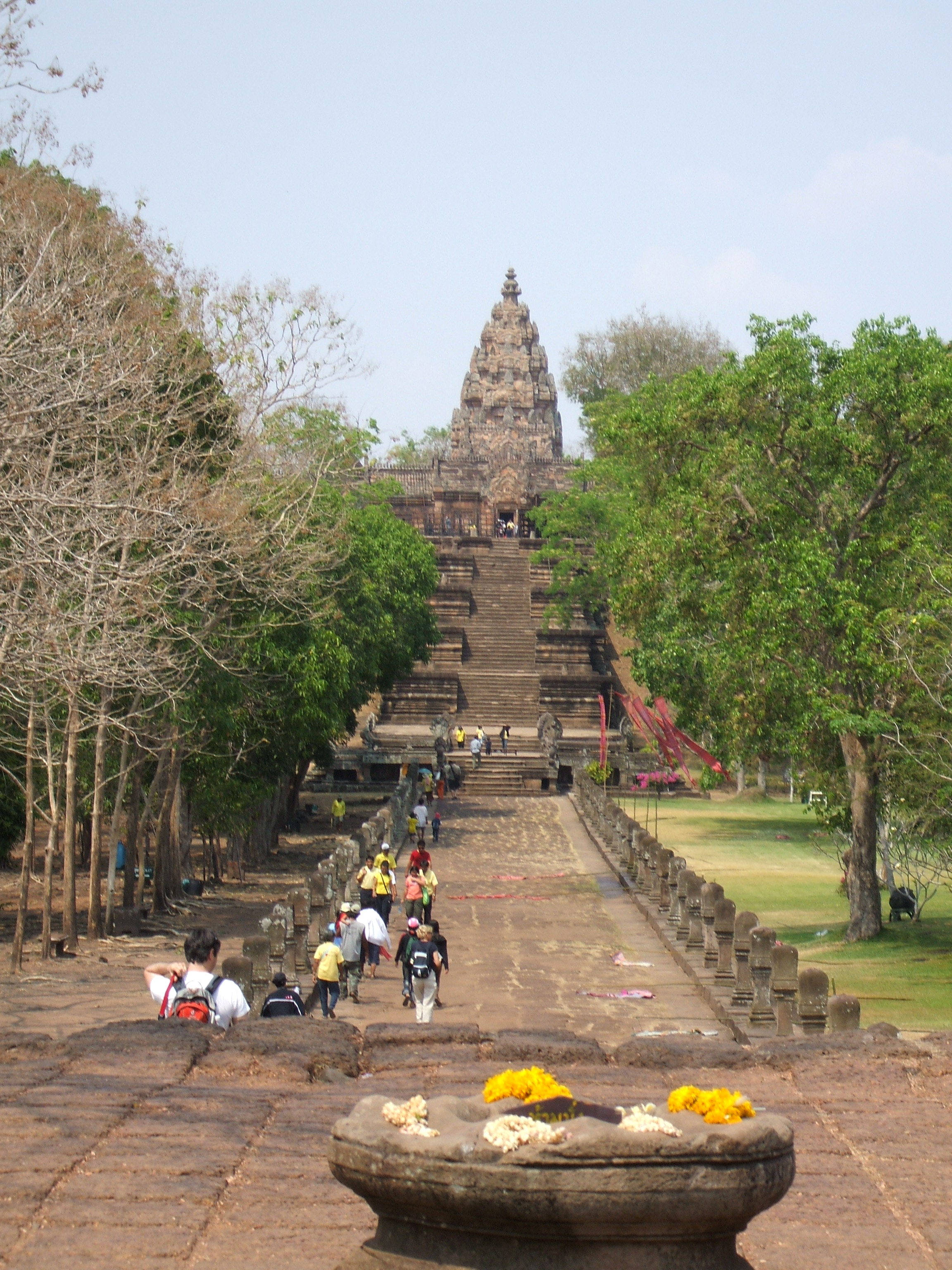 Prasat Phnom Rung